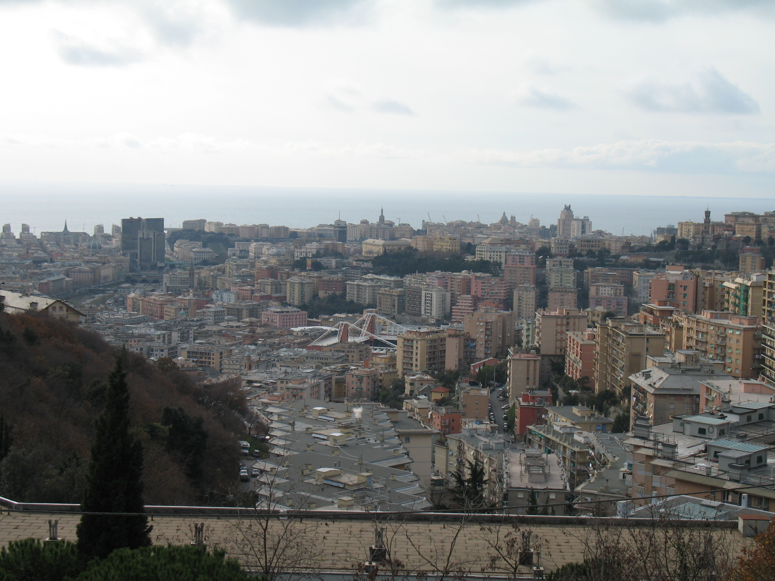 Immagine da Genova - Alture di Quezzi